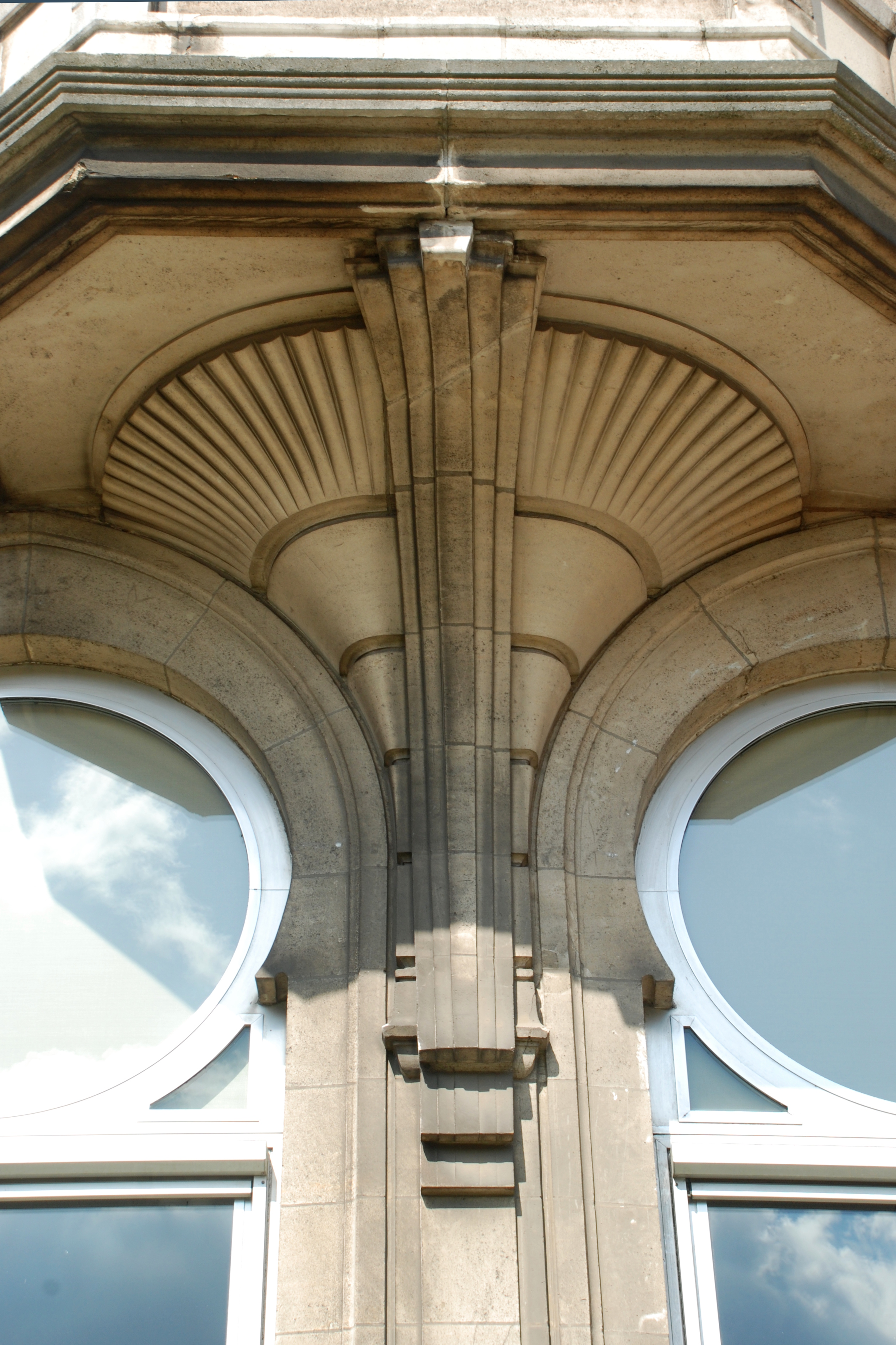 Belgique - Bruxelles - Hôtel Defize